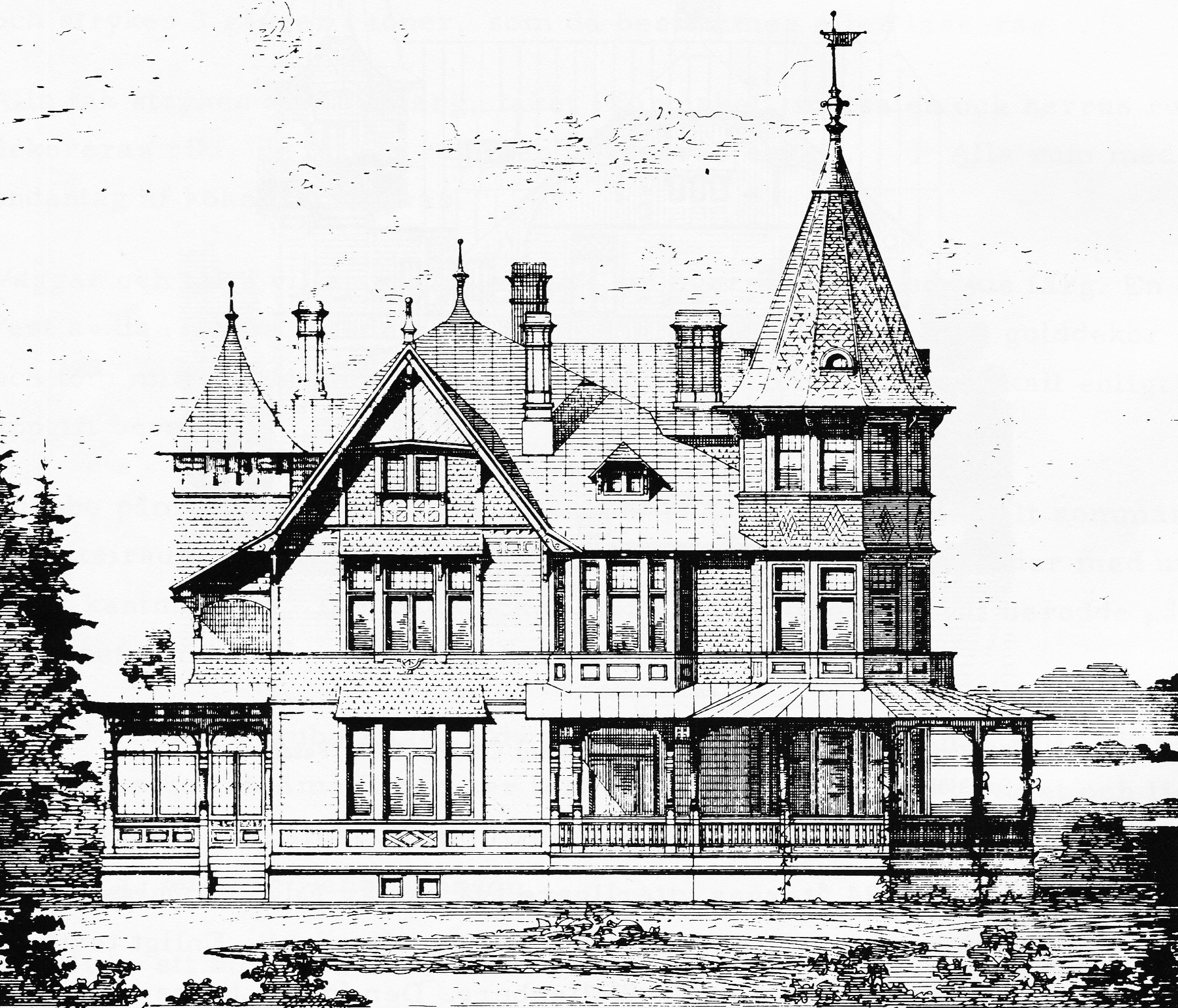 Malmska villan, ritning till patriciervilla i Saltsjöbaden av Edward Ohlsson för bankdirektören K.A. Wallenberg. Villan ritades och byggdes 1892 på Saltsjöpromenaden 10, den revs på 1960-talet.